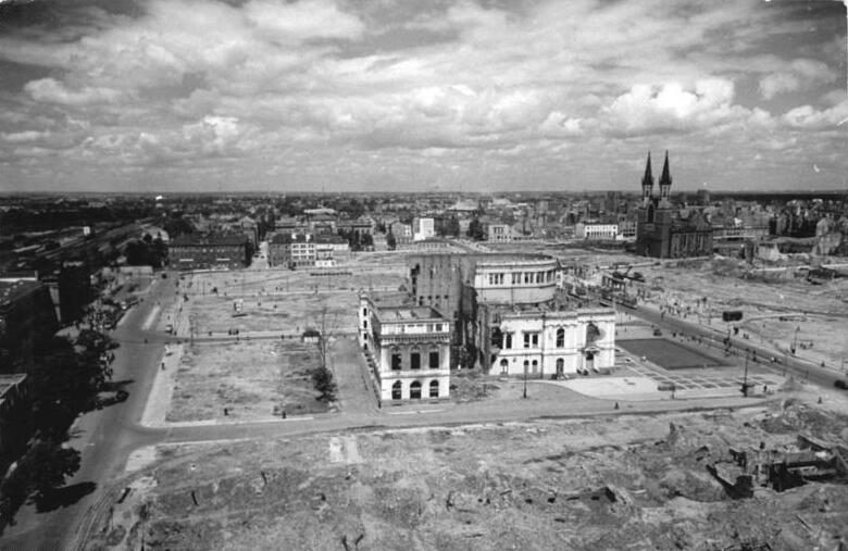 Illus-Biscan Gr-Be. 30.11.50 Magdeburg baut auf. Im Fünfjahrplan ist der Wiederaufbau von 53 durch anglo-amerikanische Bomben zerstörten Städten in der Deutschen Demokratischen Republik vorgesehen. Für den Wohnungsbau sowie für Kommunal-, Sozial- und Kulturbauten wurden für die Jahre von 1951 bis 1955 ca 4,16 Milliarden DM veranschlagt. Auf den Wiederaufbau der Stadt Magdeburg entfallen allein 238 Millionen DM. Die völlig zerstörte Innenstadt von Magdeburg wurde bereits enttrümmert. Alle wertvollen Baudenkmäler werden restauriert, neue Verwaltungsbauten und Kulturstätten entstehen und riesige Wohnblocks werden für die Werktätigen nach modernsten Gesichtspunkten errichtet. UBz Der Platz vor dem Hauptbahnhof in Magdeburg ist bereits völlig enttrümmert. Nur die Ruine des Stadttheaters, die wieder ausgebaut werden soll, steht noch.